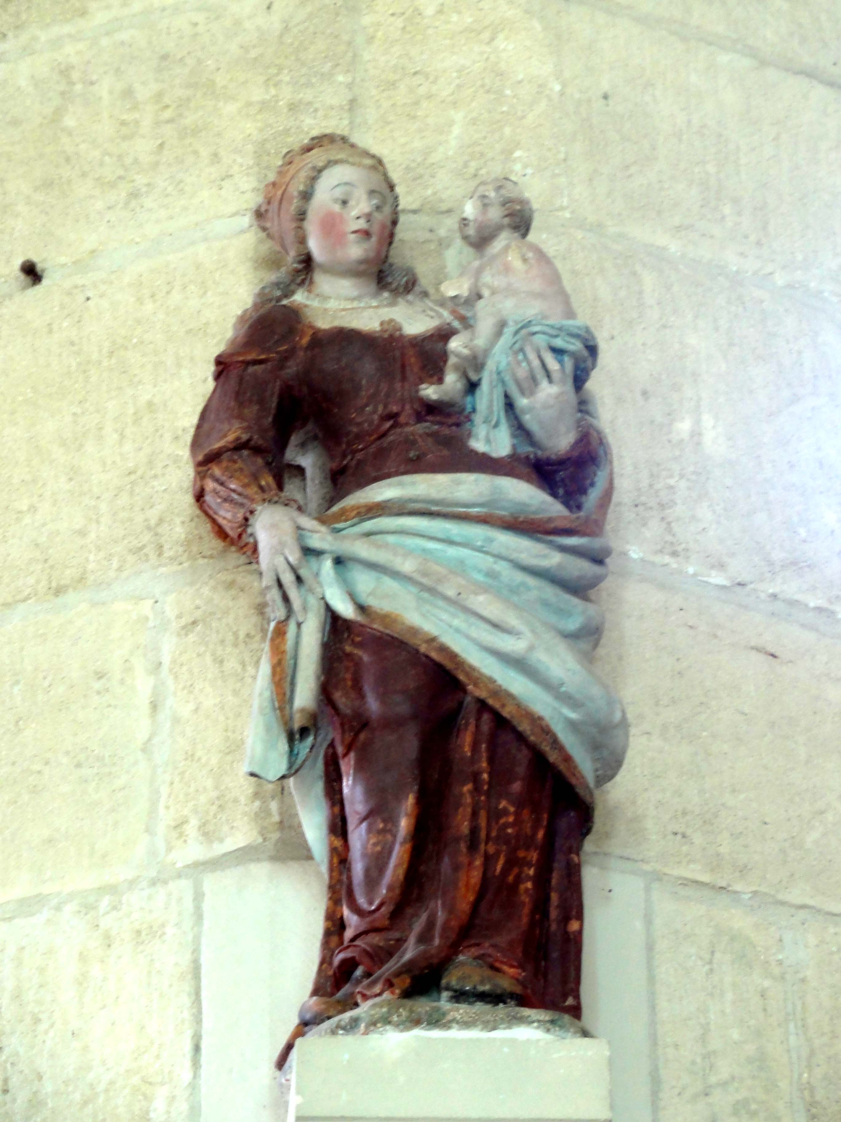 Mobilier de l'église (voir titre).